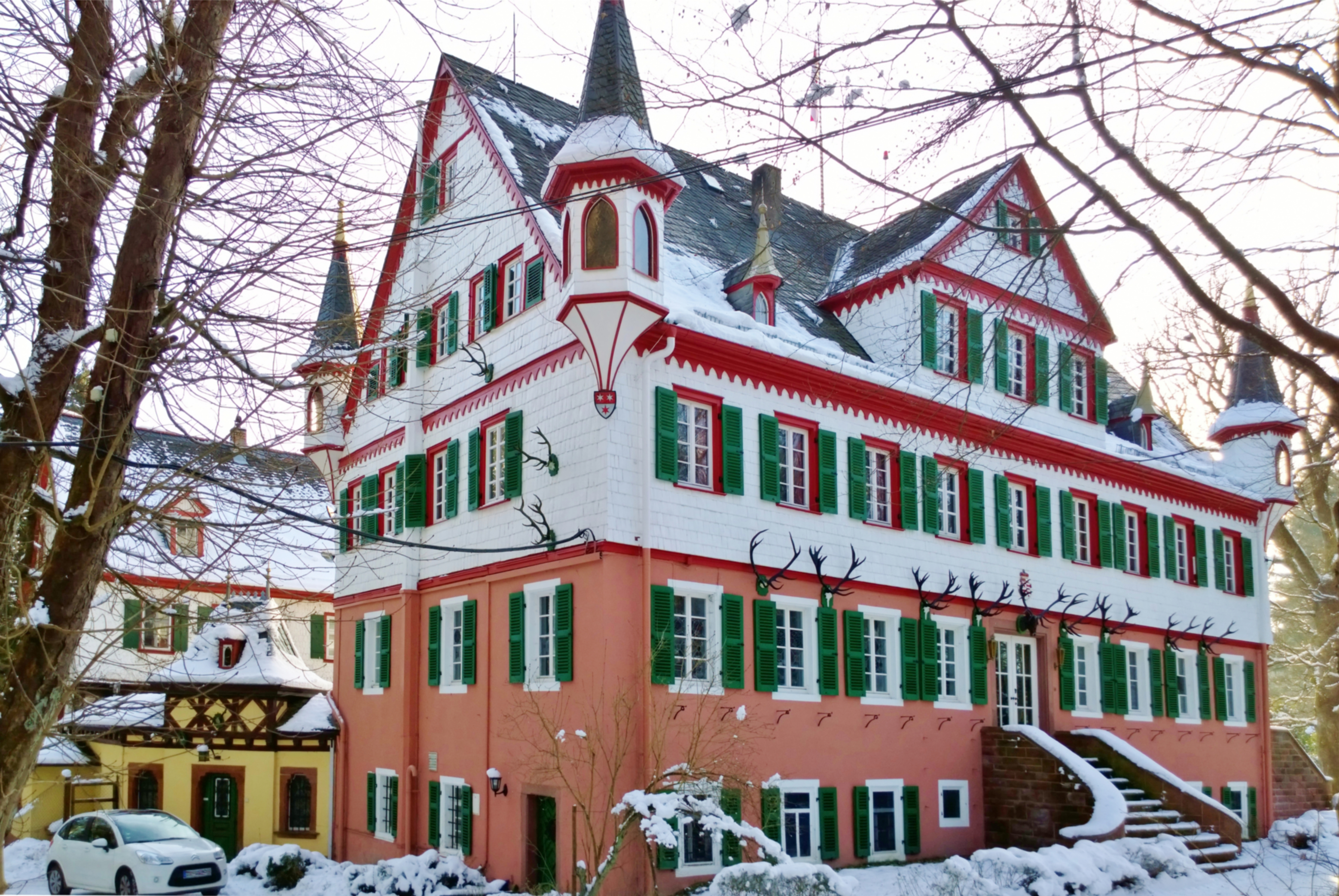 Blick von der B47 auf den nördlichen Baukörper und den Verbindungstrakt des Jagdschlosses Eulbach, Michelstadt, Odenwald